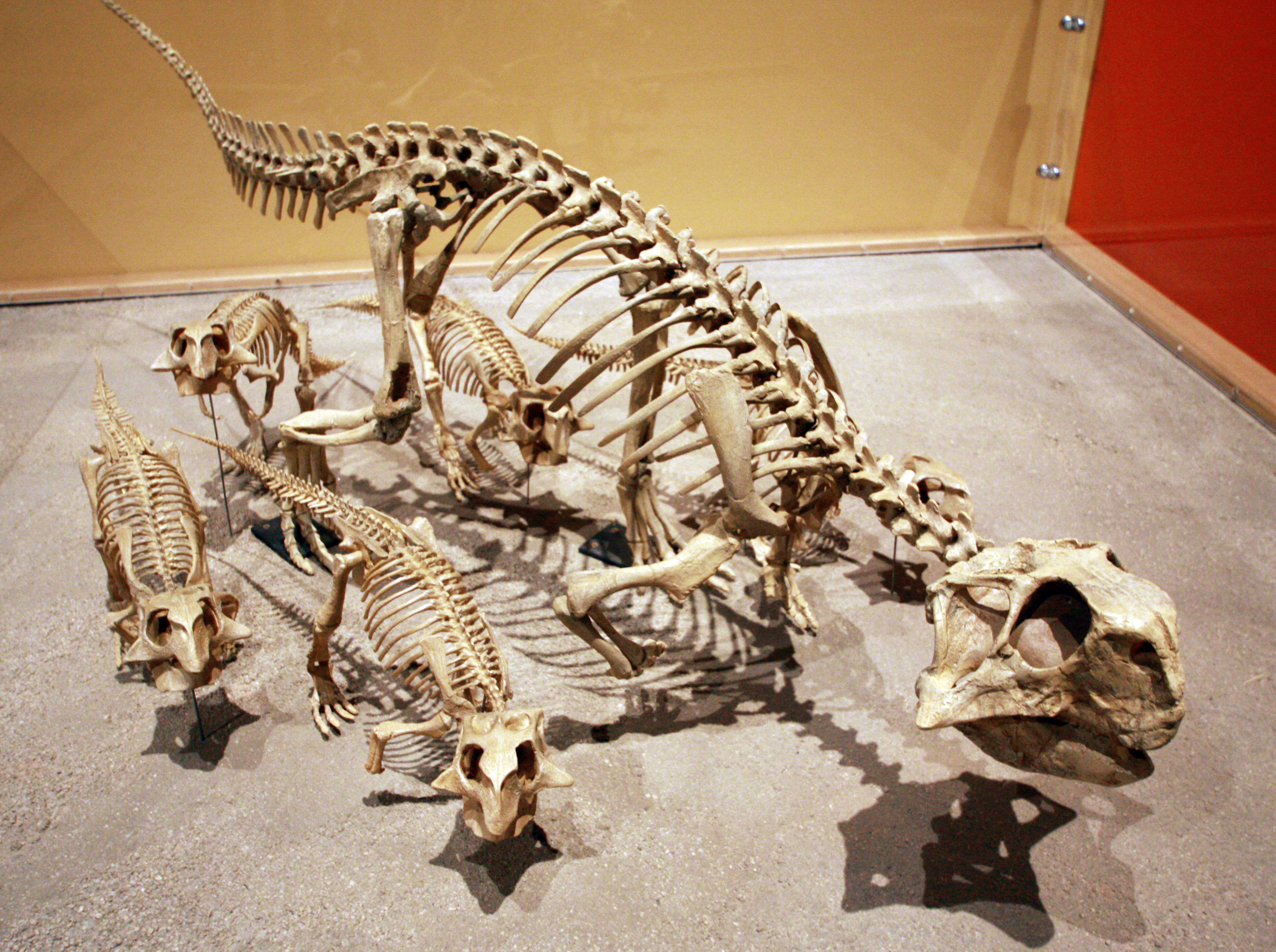 PREHISTORIC AGE 3